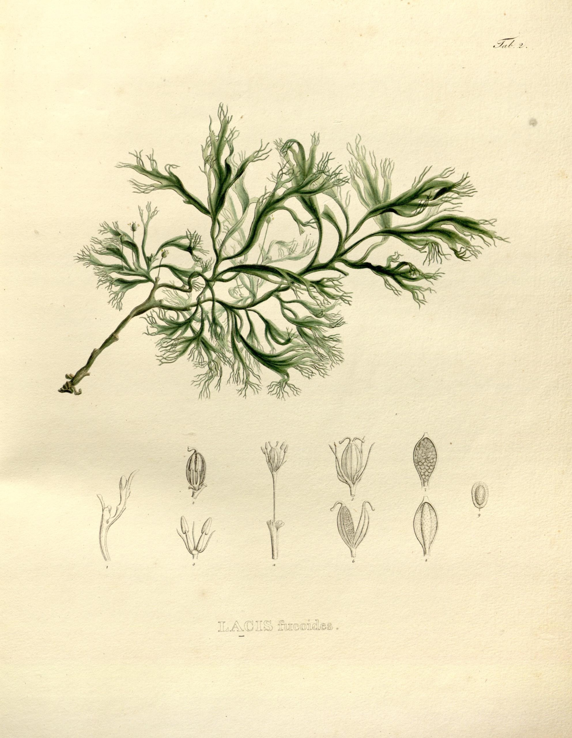 Lacis fucoides Mart. & Zucc. = Apinagia fucoides (Mart. & Zucc.) Tul. Nova genera et species plantarum. Monachii [Munich] :Impensis Auctoris,1824-1829 [i.e. 1824-32]..